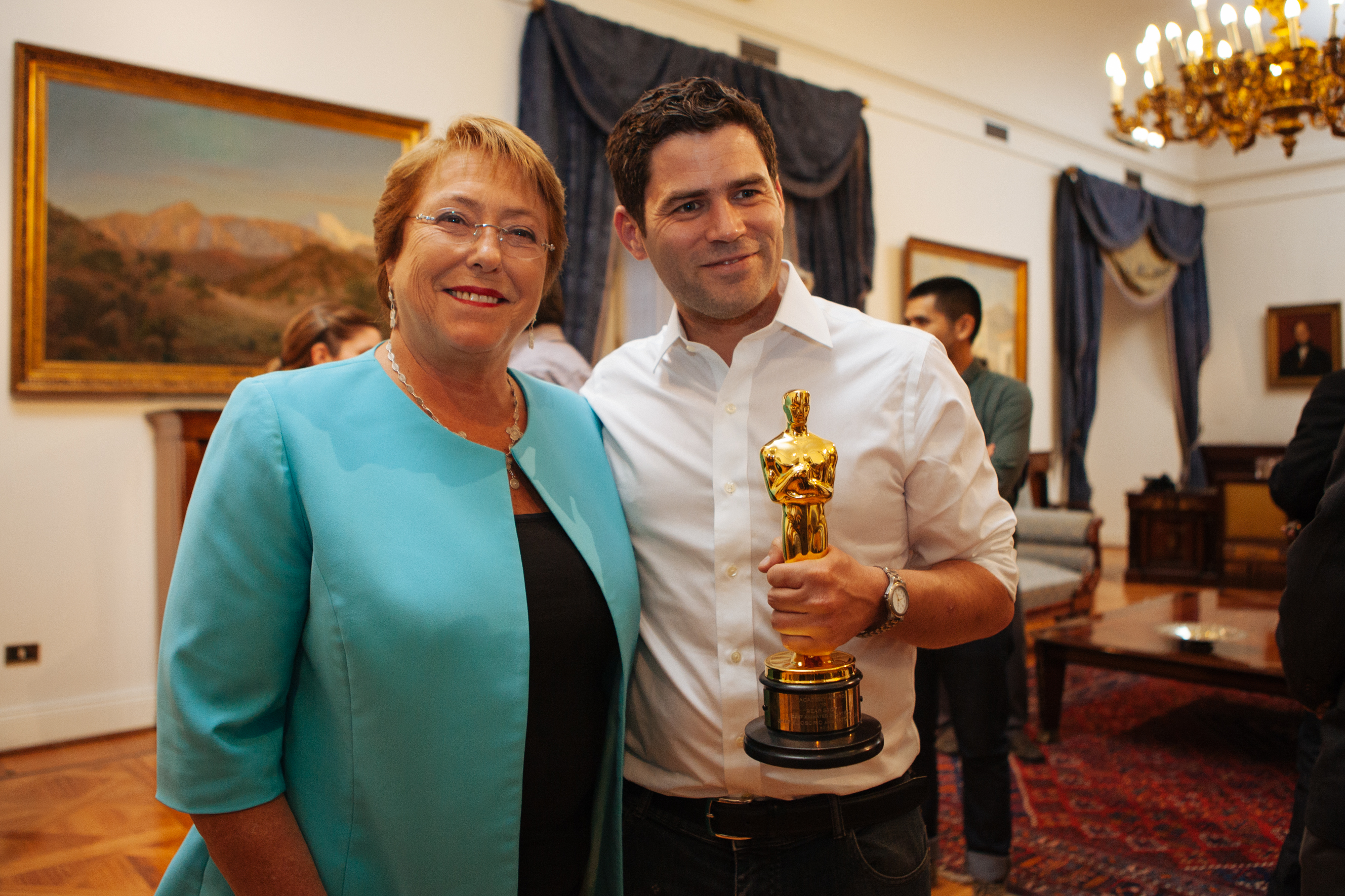 La Presidenta de la República, Michelle Bachelet, junto al ministro de Cultura, Ernesto Ottone recibió a los creadores del cortometraje “Historia de un Oso”, Gabriel Osorio y Patricio Escala, quienes el domingo 28 de febrero recibieron el primer Oscar a una producción audiovisual creada en Chile por realizadores nacionales.